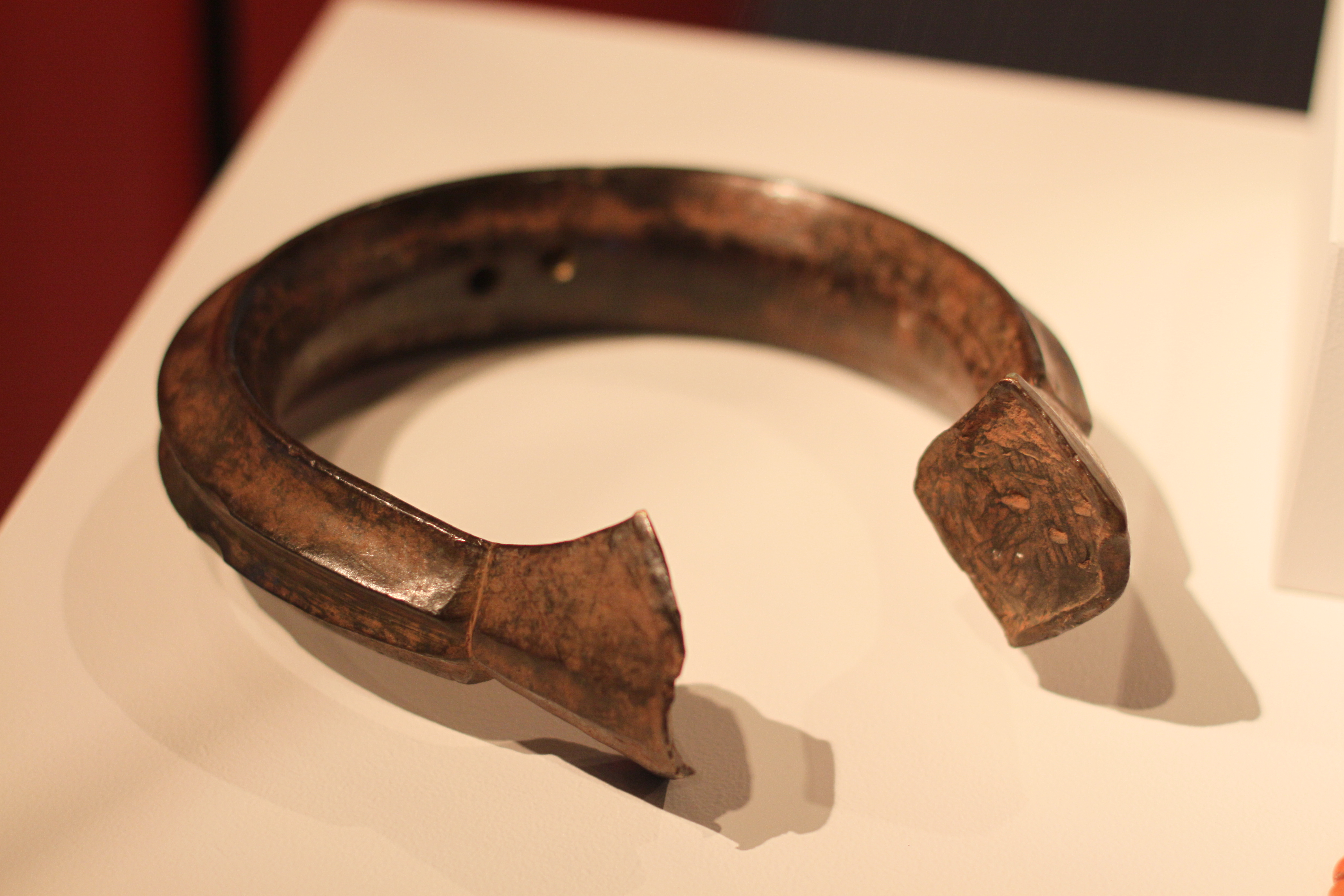 Manilla aus Messing (Zahlungsmittel); 17. Jh.; Königreich Benin; Afrikaabteilung im Ethnologischen Museum, Berlin, Inv. Nr. III C 8496